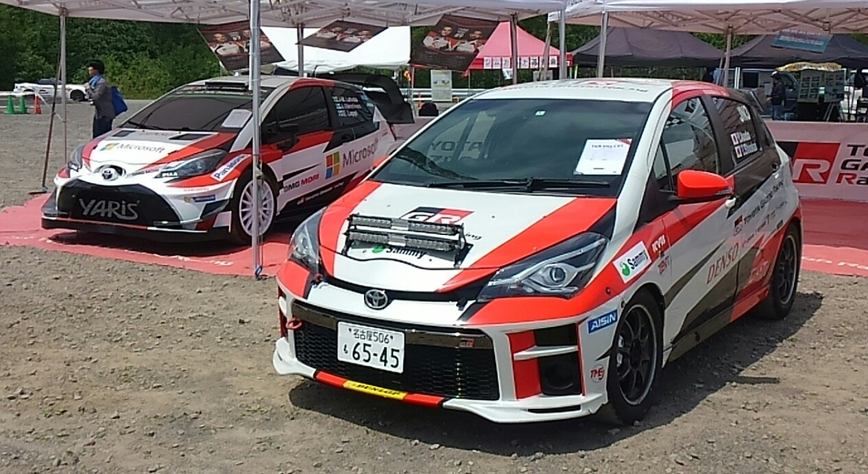 ラリー・モントレーにて展示された、ヤリスWRCとヴィッツGRMNの競技車両